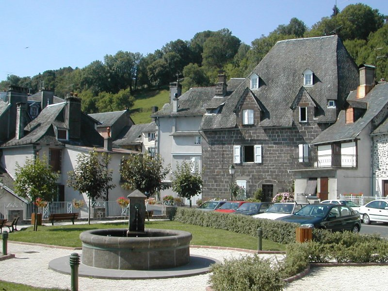 Vue du village de Saint Cernin (Cantal, France).